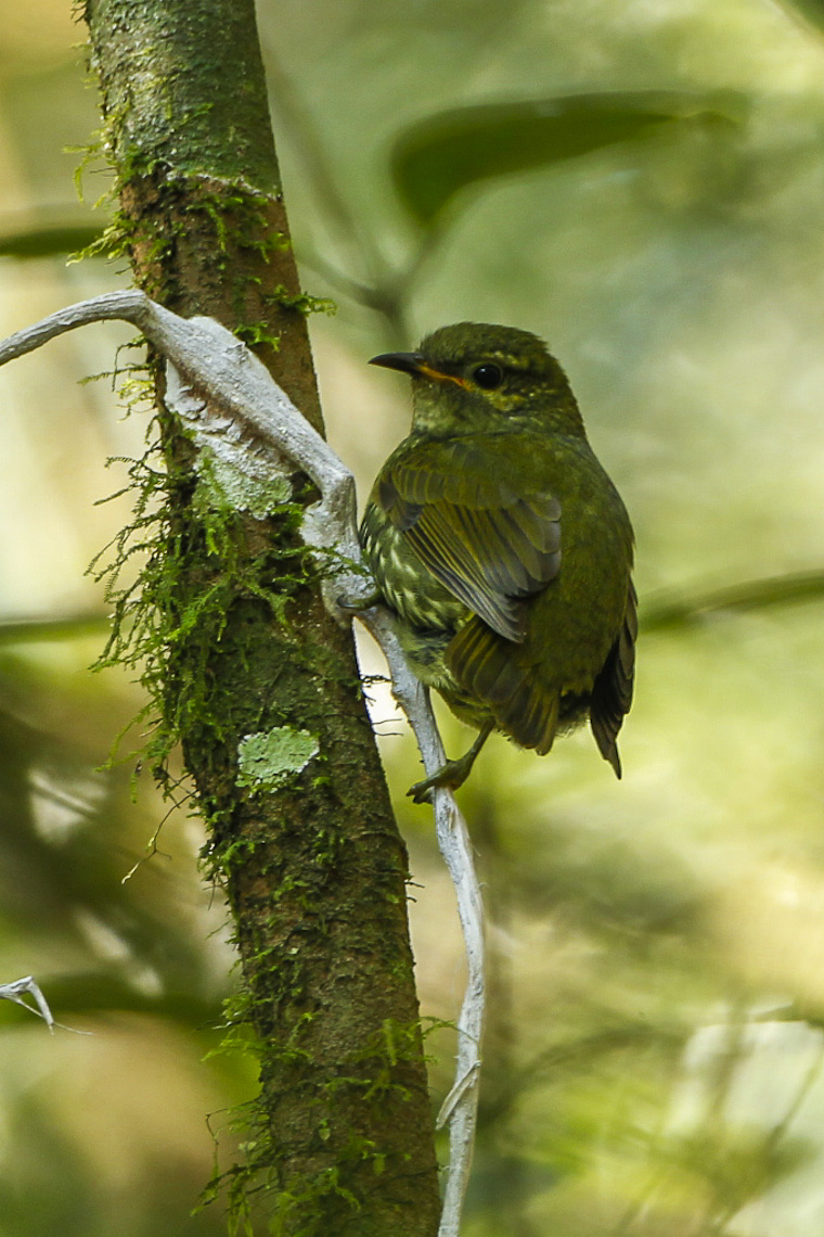 Velvet Asity fem - Ranomafana - Madagascar